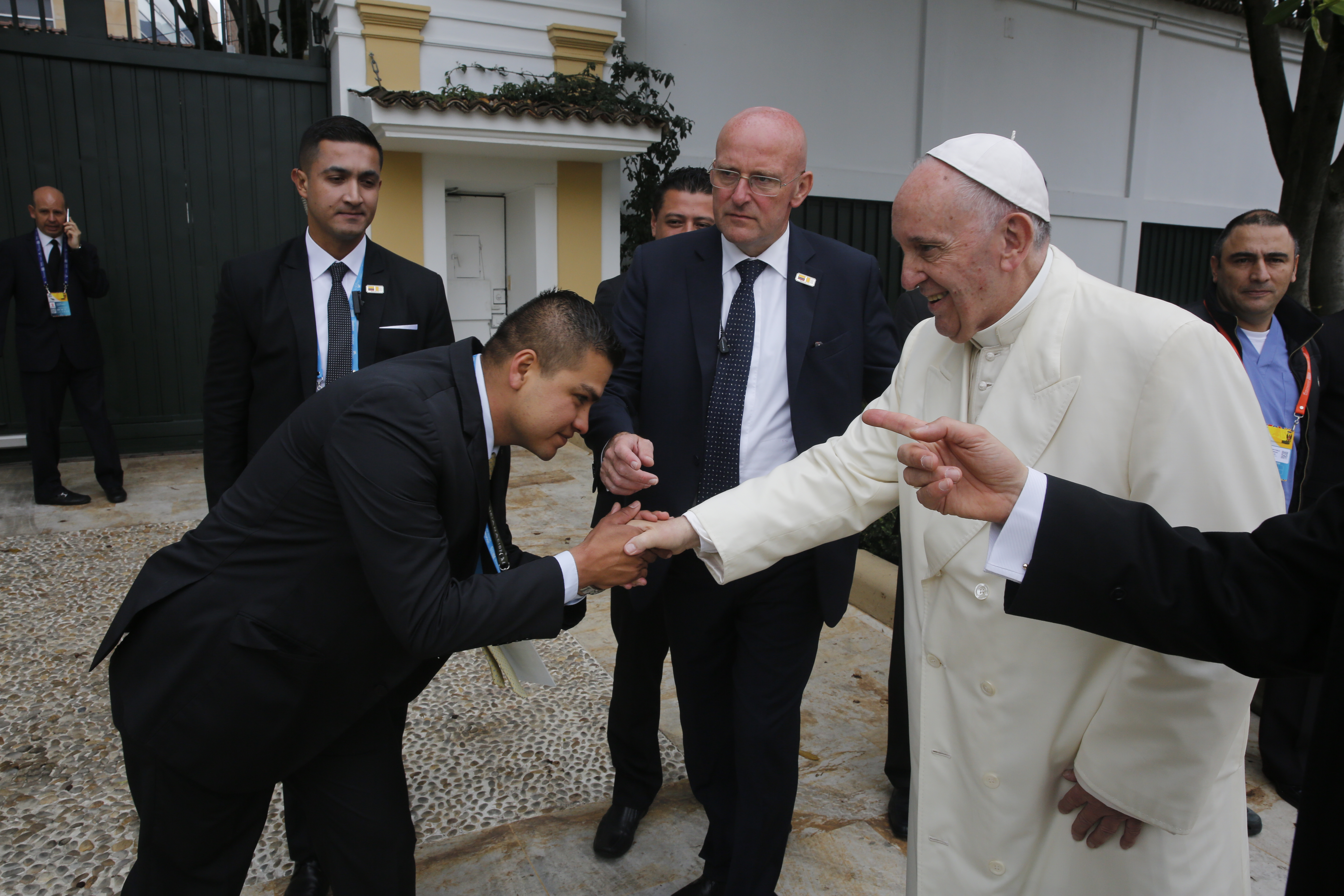 Saludo de su santidad el Papa Francisco a un personal de la Policía Nacional